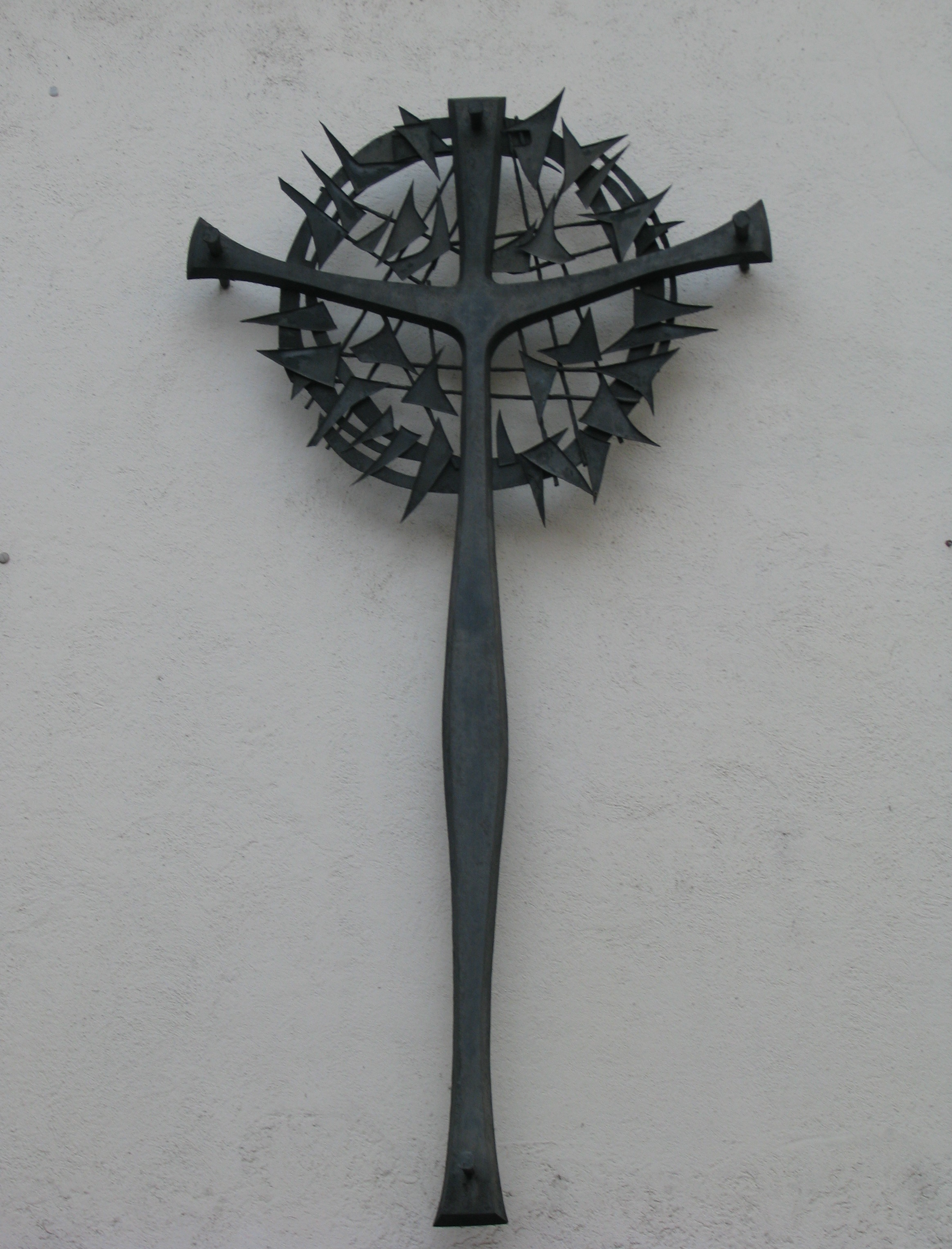 Bronzekreuz von Harry MacLean an der Fassade der Erlöserkirche in Heidelberg